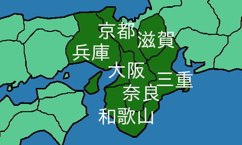 近畿地方の自治体